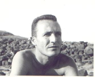 Portrait